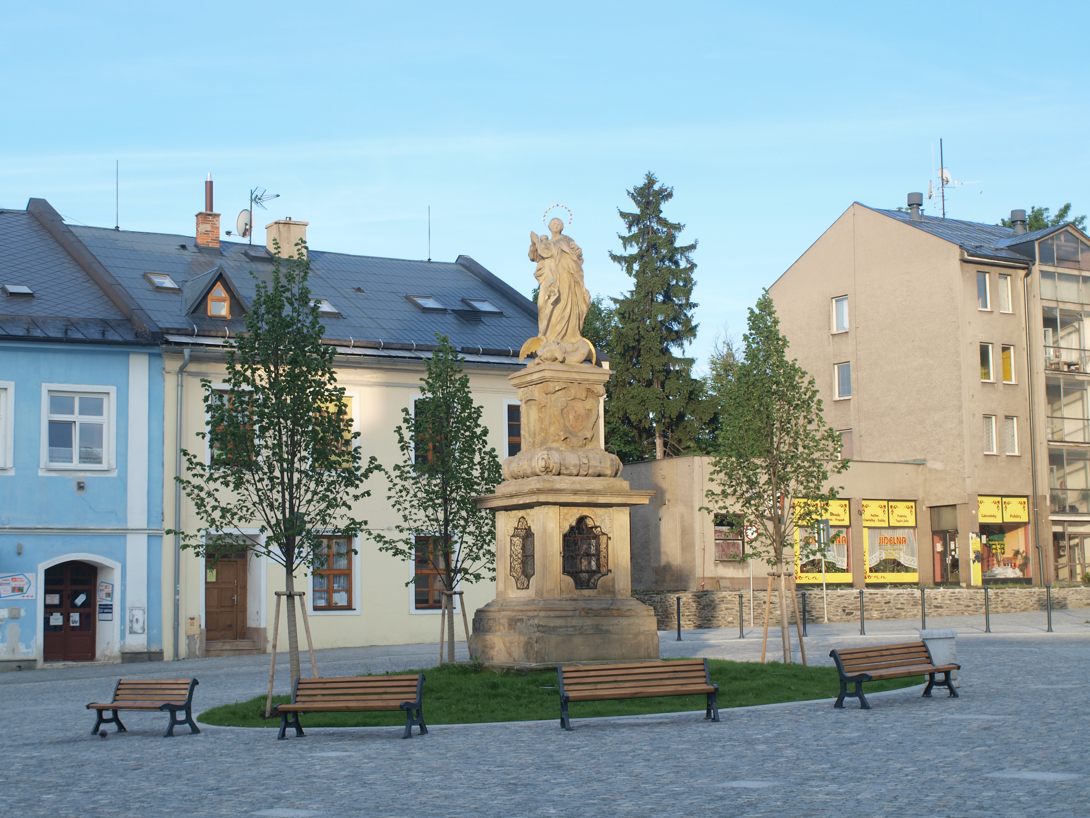 Rýmařov - sloup se sochou panny Marie z roku 1683